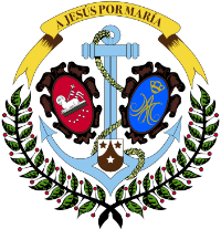 Escudo corporativo Hermandad del Carmen